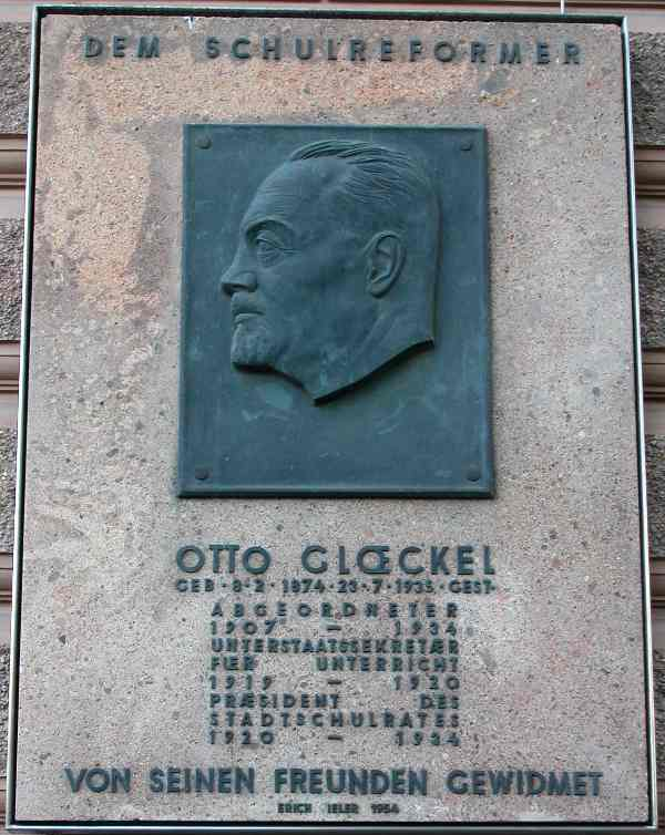 Gedenktafel für Otto Glöckel. Das Bronzerelief hat der akademische Bildhauer Professor Erich Pieler 1954 geschaffen. Die Gesamtausführung besorgte der Bildhauer Viktor Hammer [1]